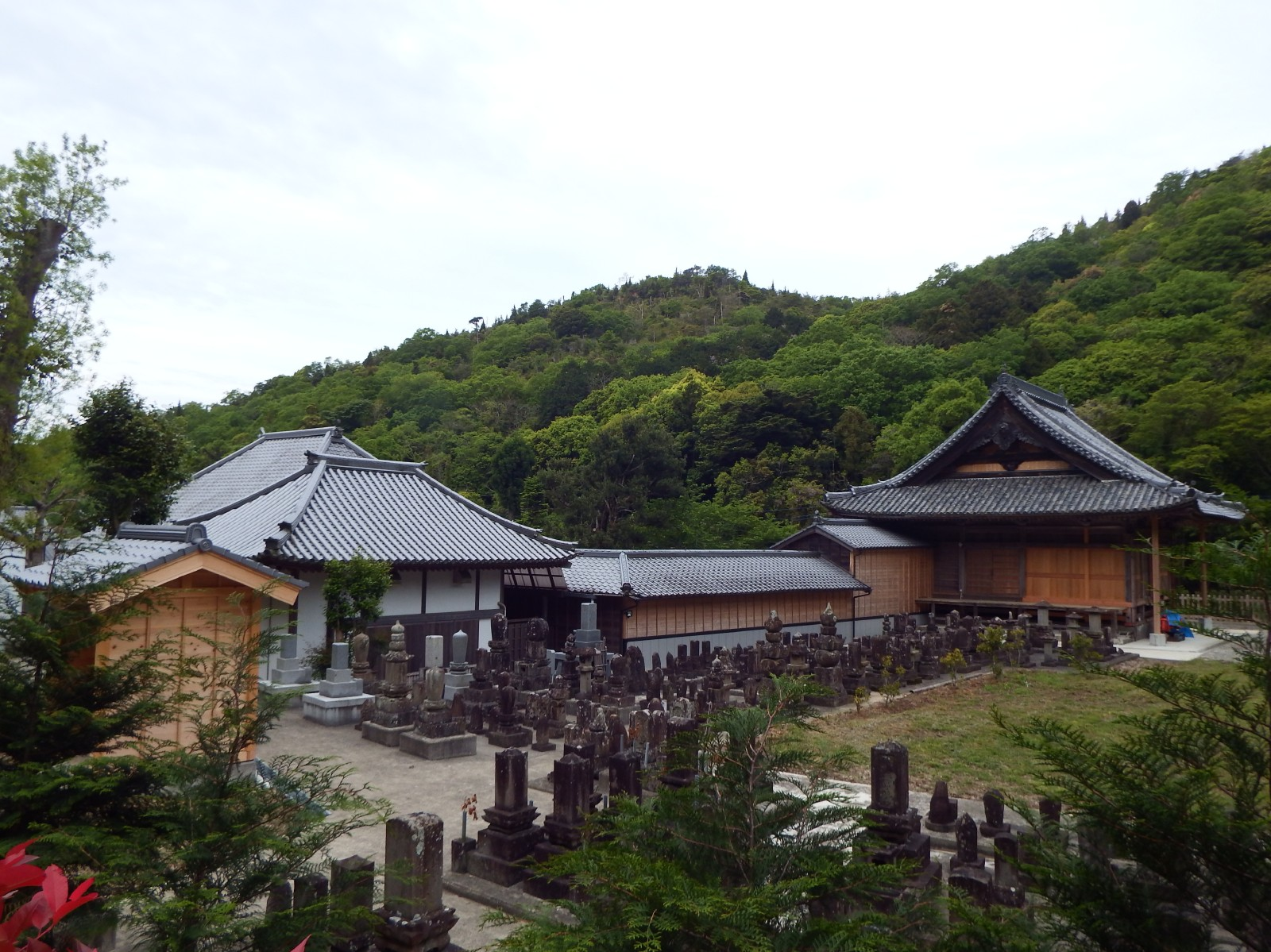 大日寺の全景を後方から